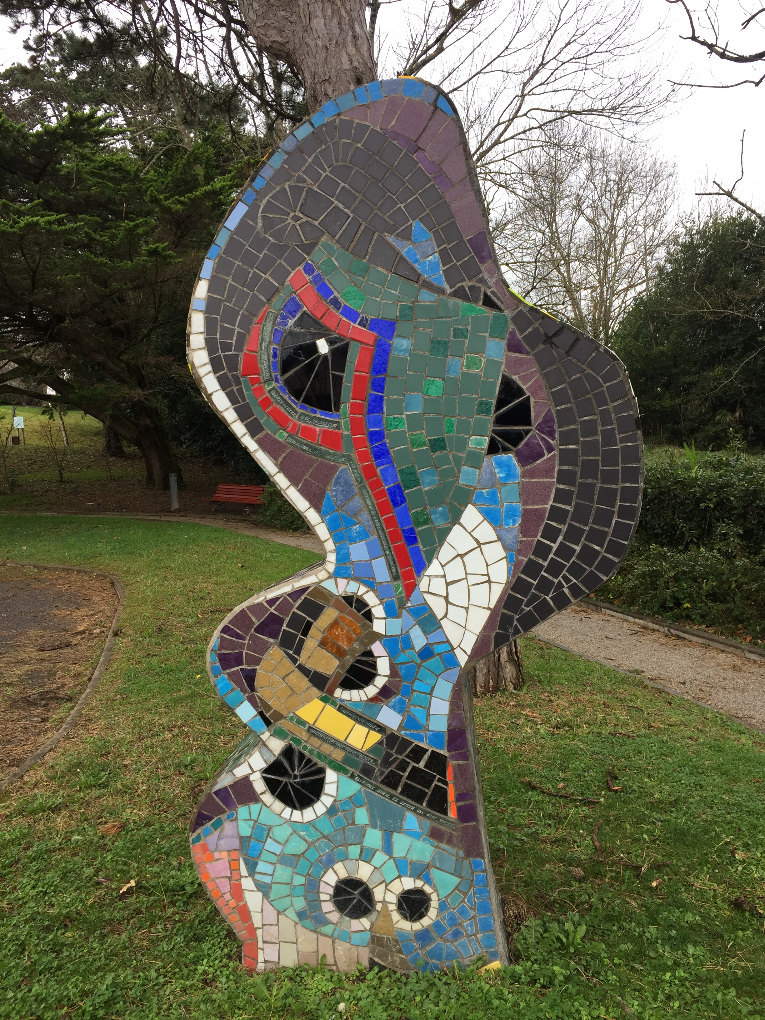 Michel Duboscq-en Galtzagorri eskultura Getariako Saraleginea etxean. Testua : "Galtzagorri zuri kondari. Hemen ekarri bere tresnakeri. Ibili, ibili, nun ibili, zer ikasi! Ta denen artean bizi berri"